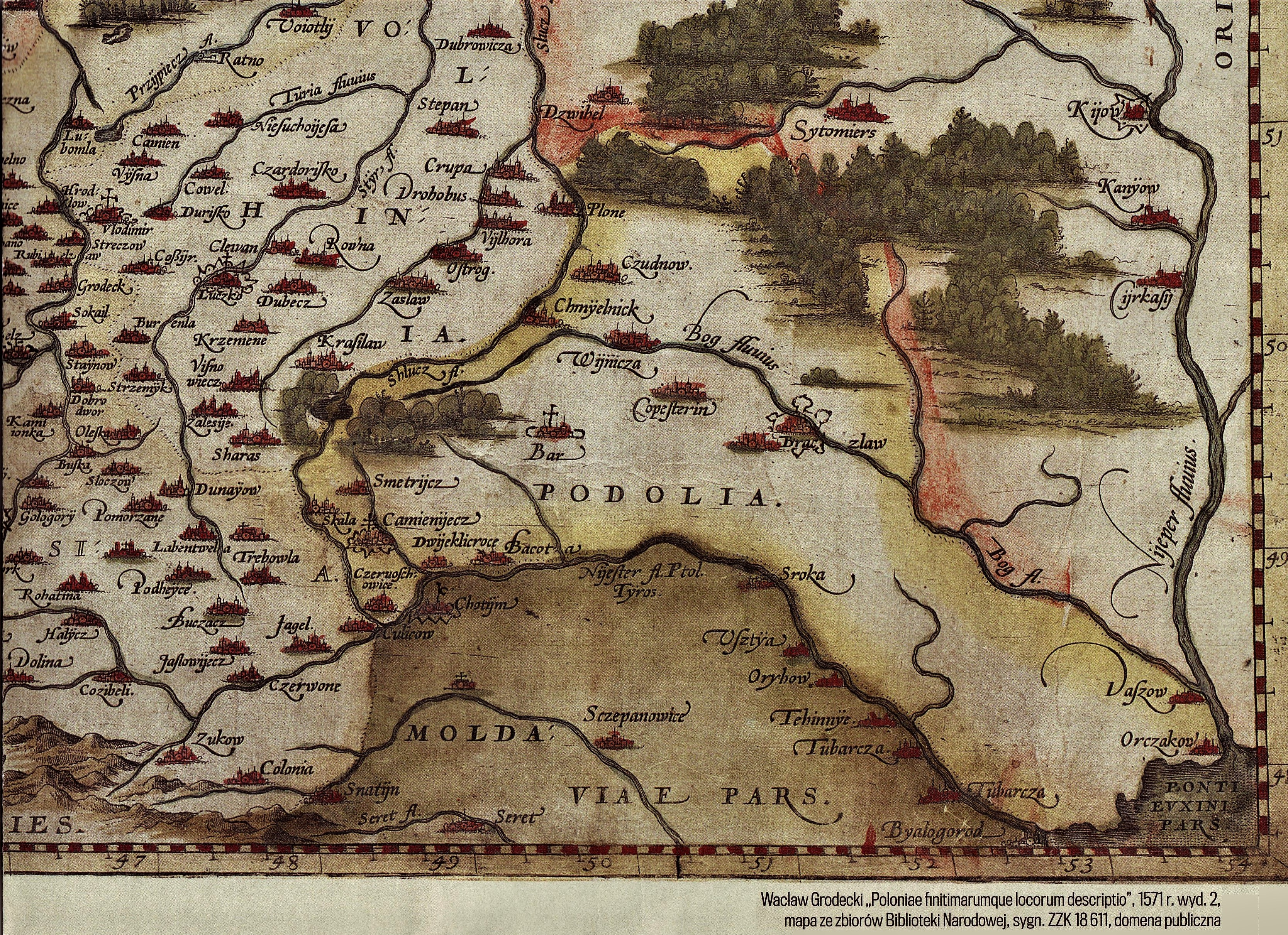 Wacław Grodecki, Poloniae finitimarumgue locarum descriptio (fragment) , 1571, wyd. 2, Biblioteka Narodowa, syg. ZZK 18611, domena publiczna